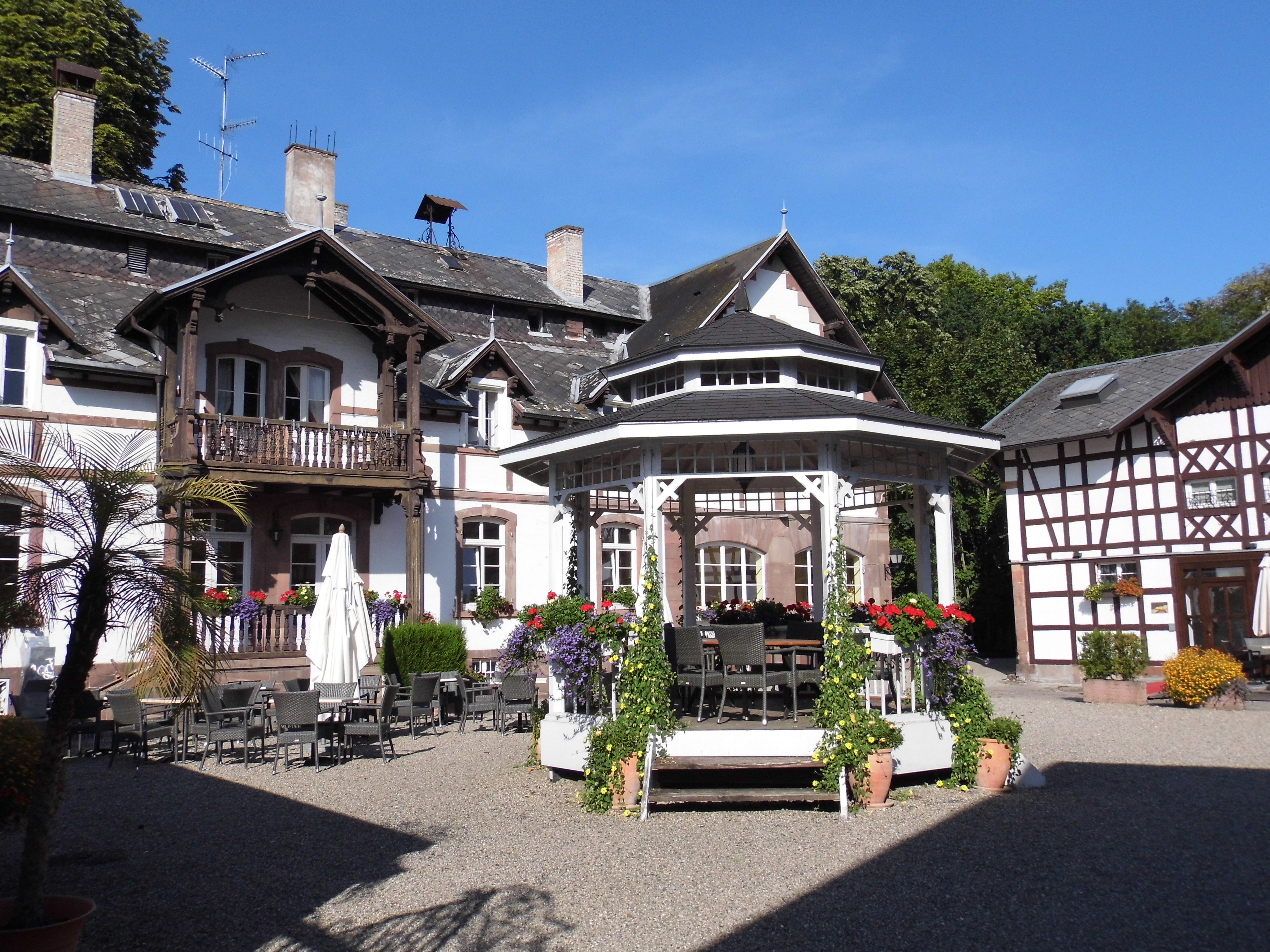 Château de Pourtales